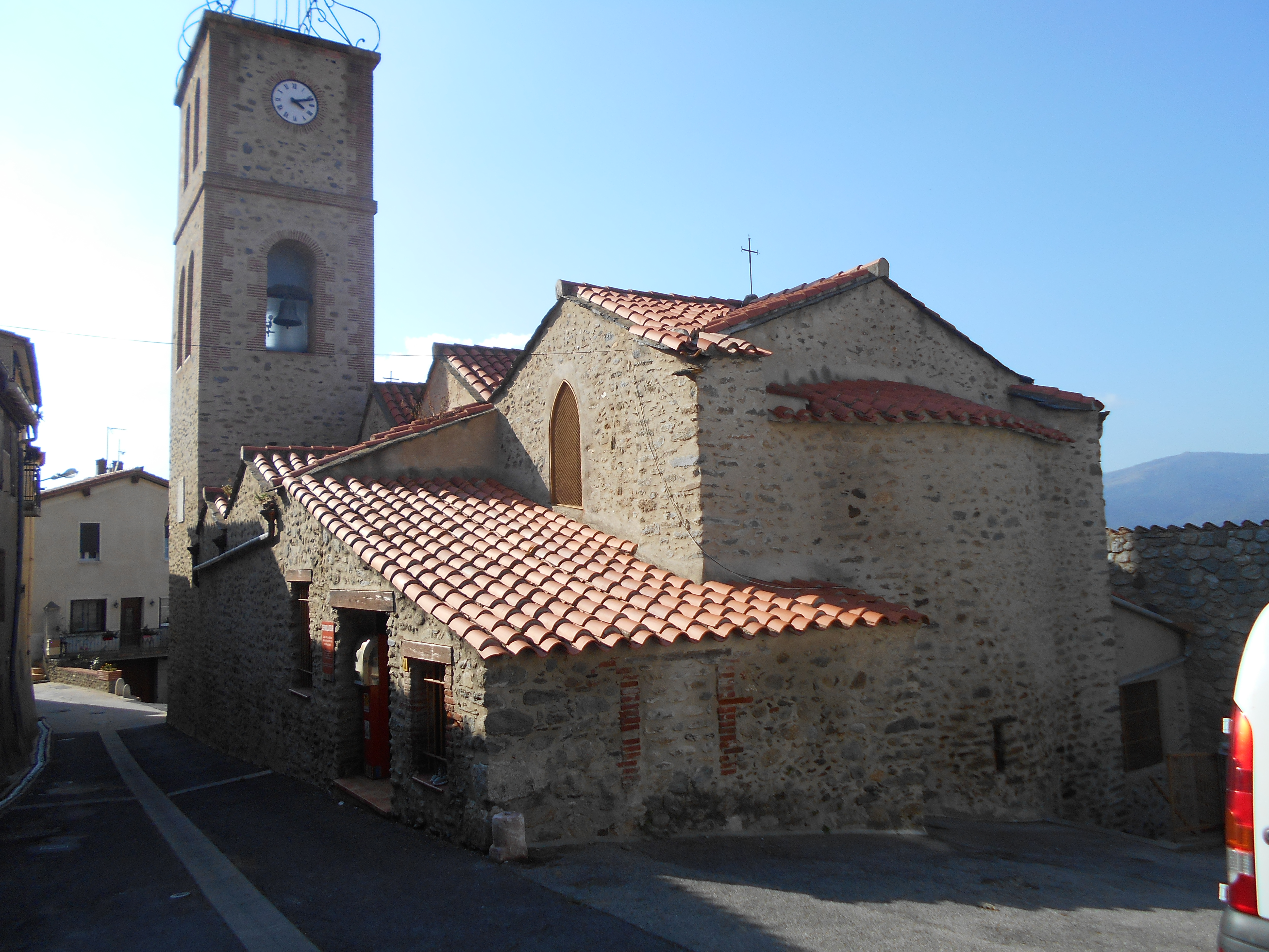 Sant Martí de Jóc, al Conflent.